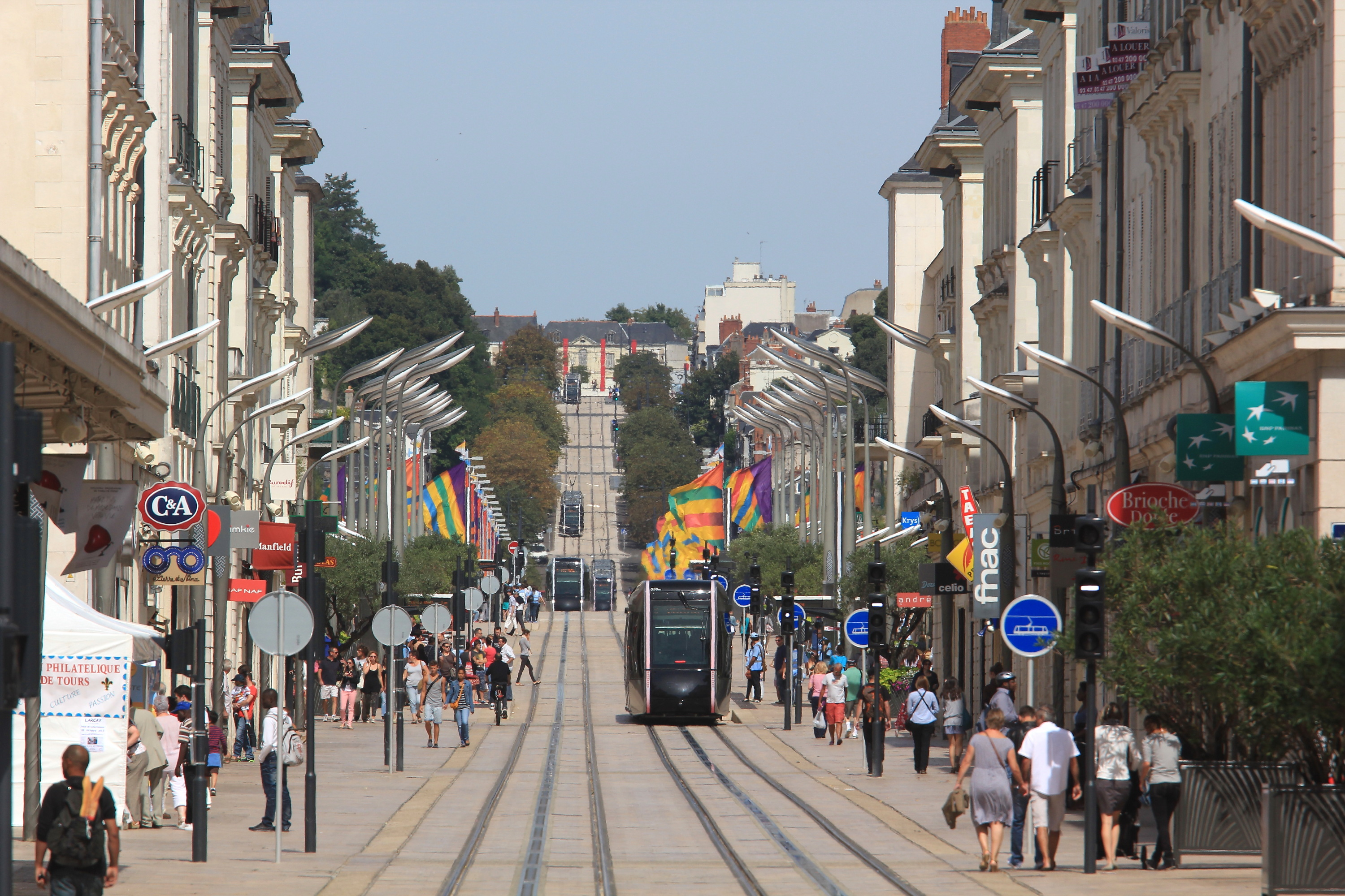 Vue de l'enfilade de la tranchée depuis la rue Nationale vers le nord, avec 4 tramways en vue.